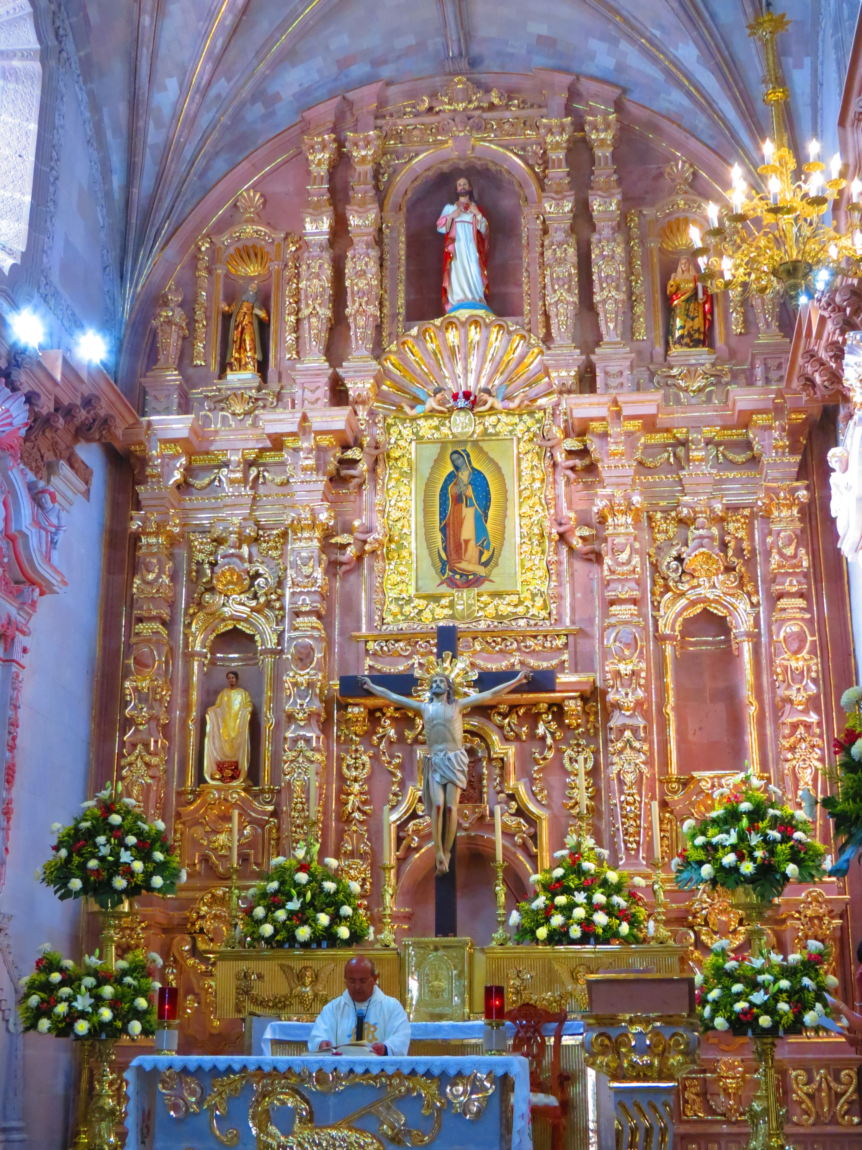 Retablo dorado Santuario de Nuestra Señora de Guadalupe, Aguascalientes. Los detalles dorados sobre el altar en cantera, fueron aplicados en 2018.